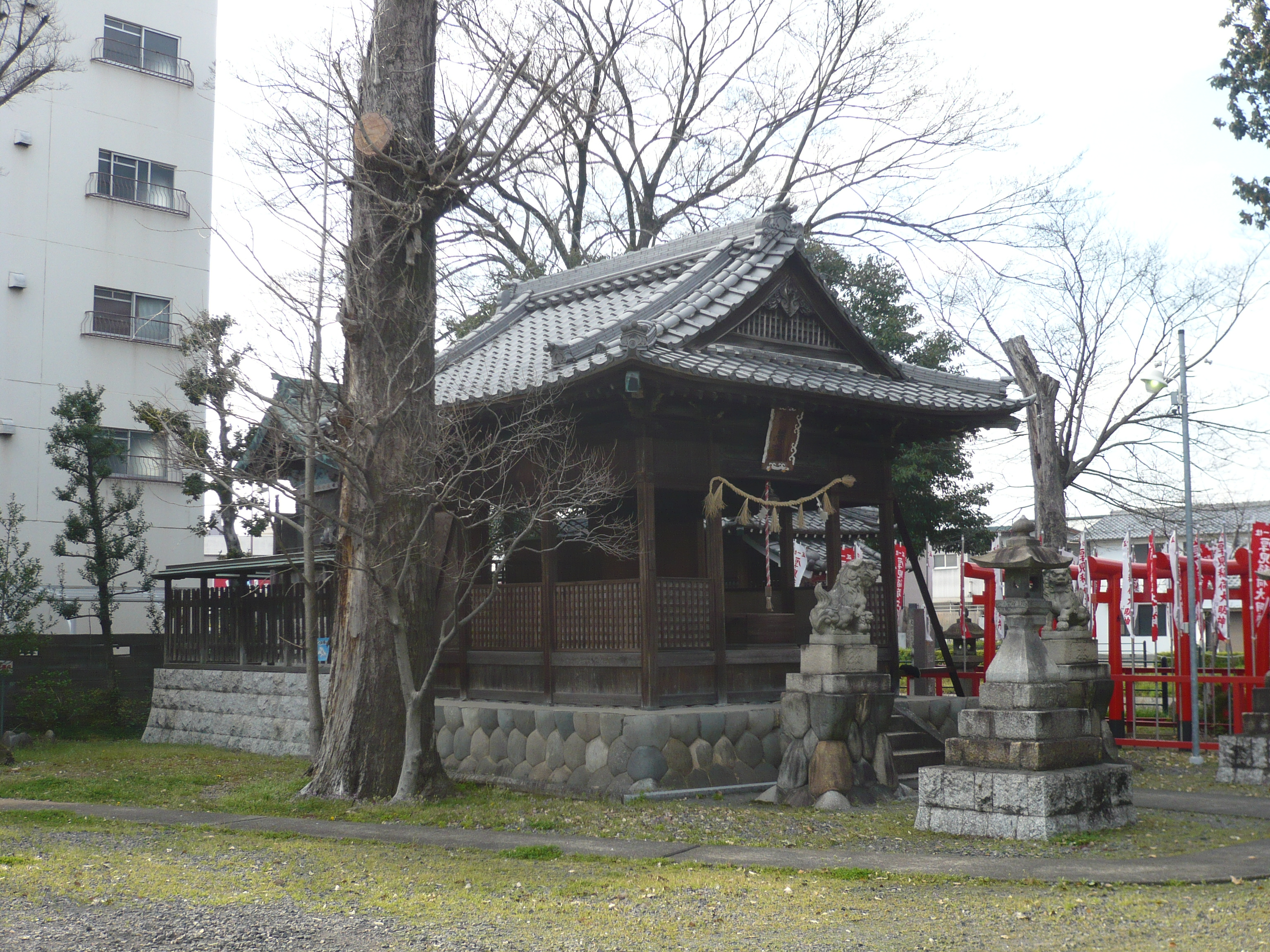 加納八幡神社